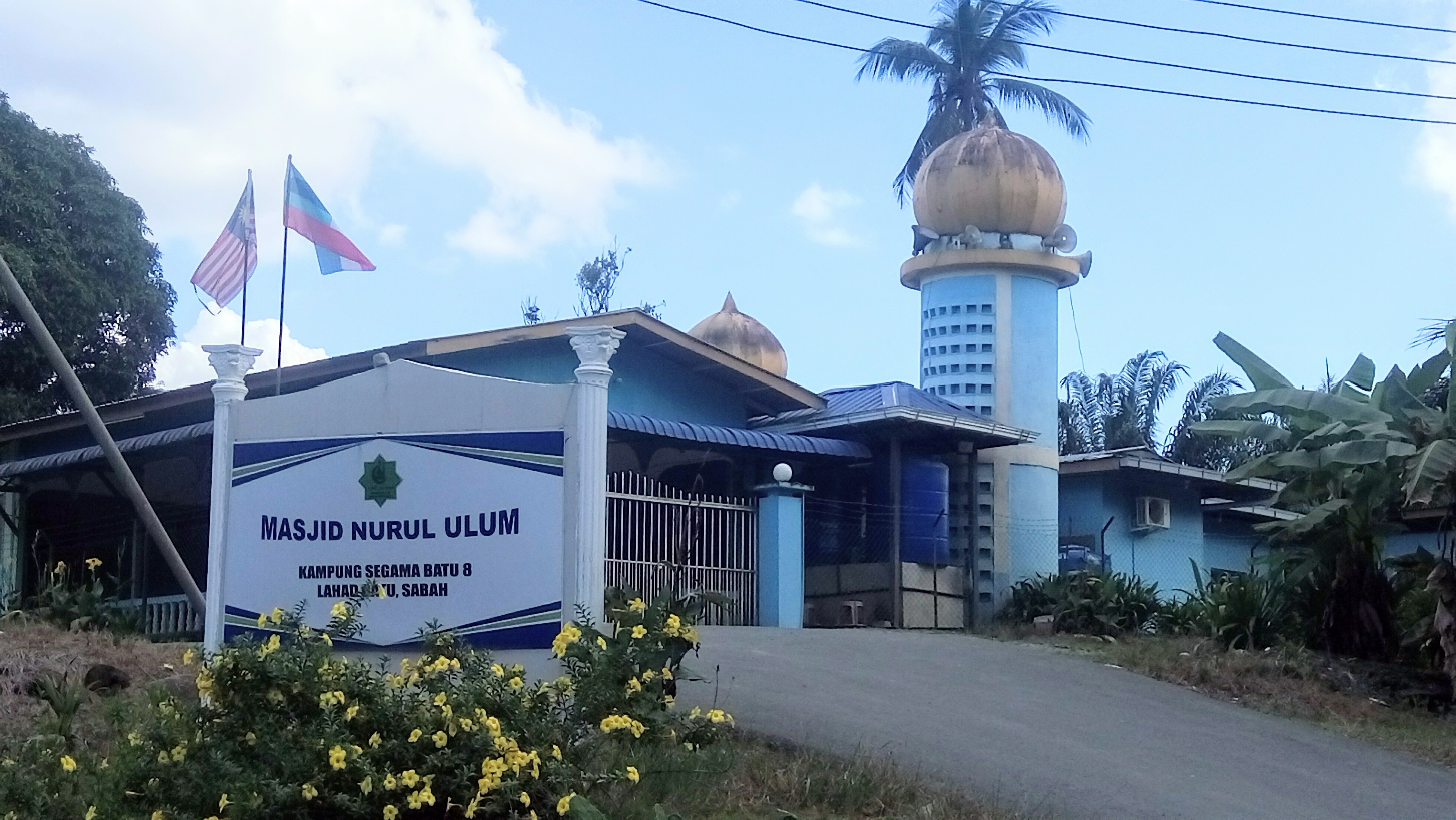 Masjid di Lahad Datu